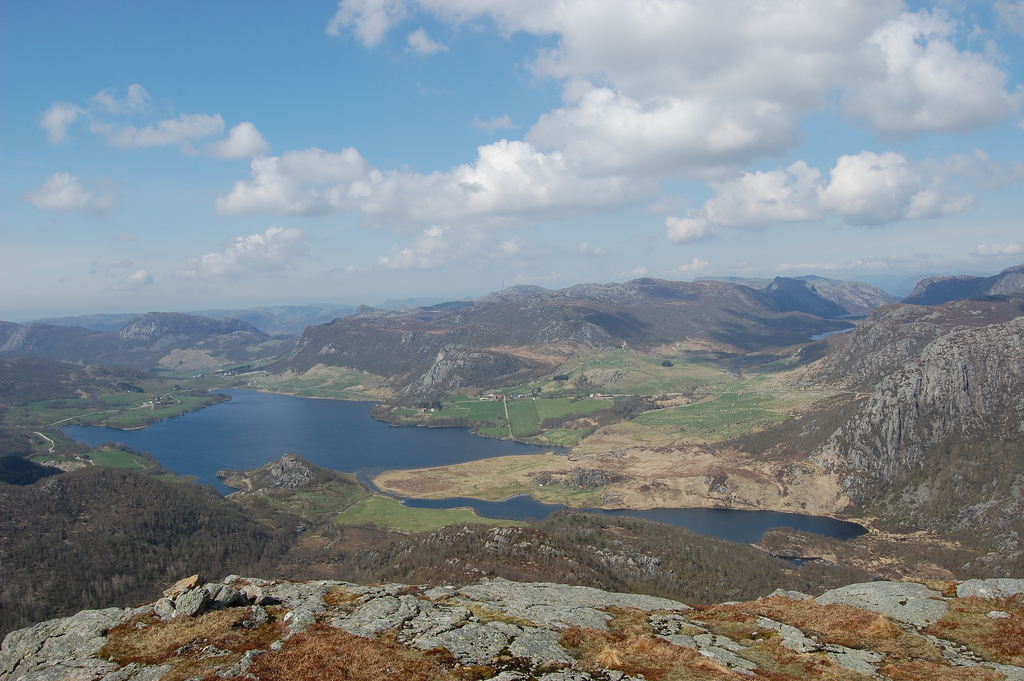 Frå Gloppenuten: Madlandvatnet, Mjåvatnet, Gloppevatnet